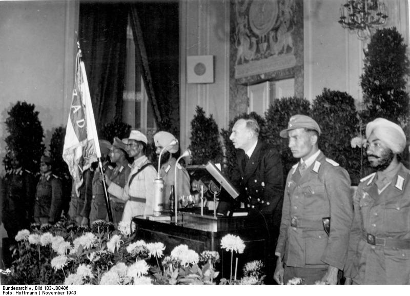 Berlin, Feier der Zentrale Freies Indien Die Feierstunde, die anlässlich der Gründung der provisorischen Indischen Nationalregierung von der Zentrale Freies Indien im Hotel Kaiserhof in Berlin stattfand, gestaltete sich zu einer flammenden Anklage gegen den britischen Hungerkrieg in Indien. Neben zahlreichen führenden deutschen Persönlichkeiten nahmen die Botschafter Japans, General Oshima und des republikanisch-faschistischen Italiens, Exzellenz Anfuso, an der Veranstaltung teil. UBz. der Staatssekretär im Auswärtigen Amt, Keppler, überbringt die Grüße und Wünsche des Reichsministers des Auswärtigen von Ribbentrop. 16.11.43 [Herausgabedatum]